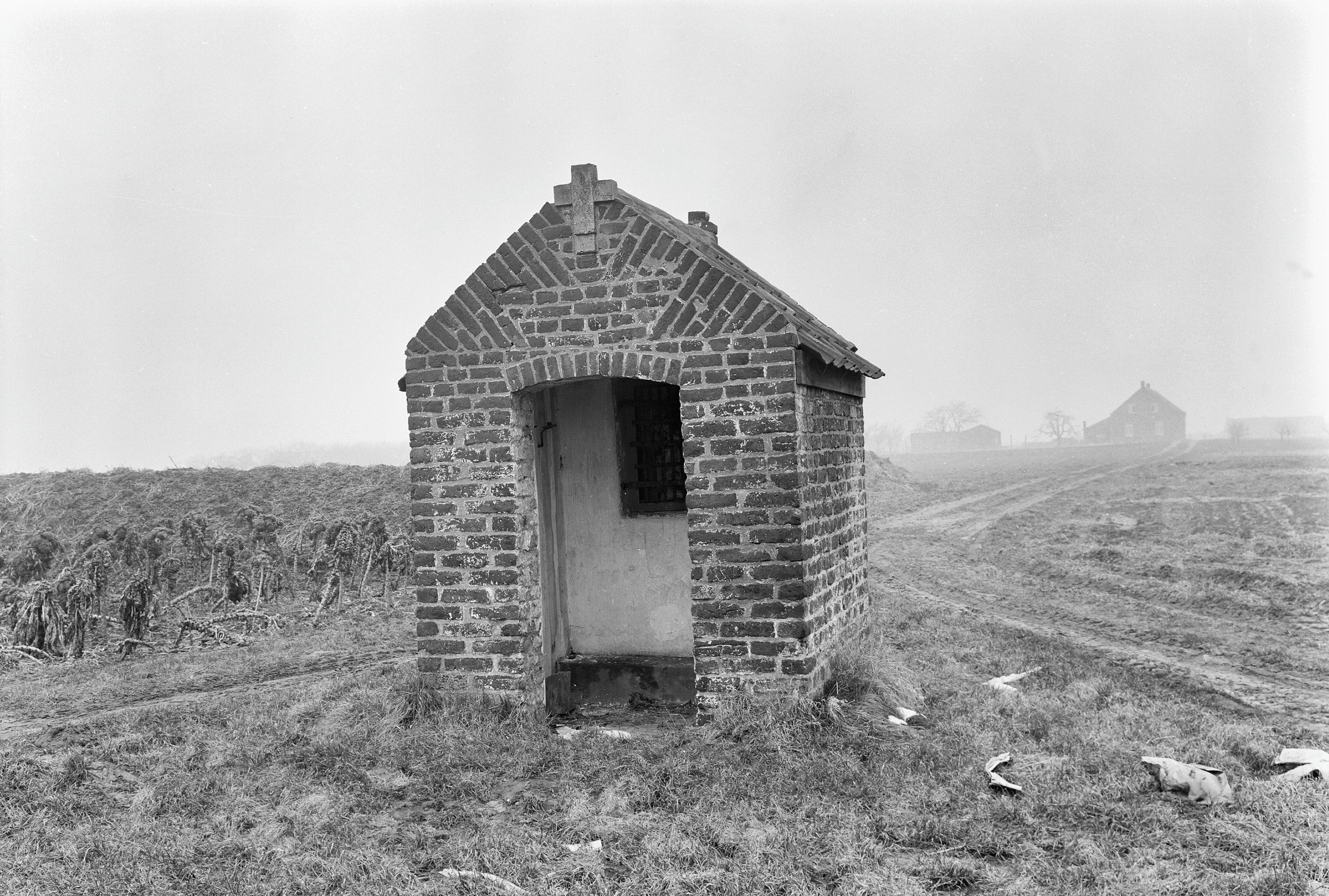 Onze Lieve Vrouw Van Smartenkapel: Kapel Onze Lieve Vrouwe van Smarten, aanzicht, in het buurtrschap Rijkel, vallende onder de gemeente Beesel